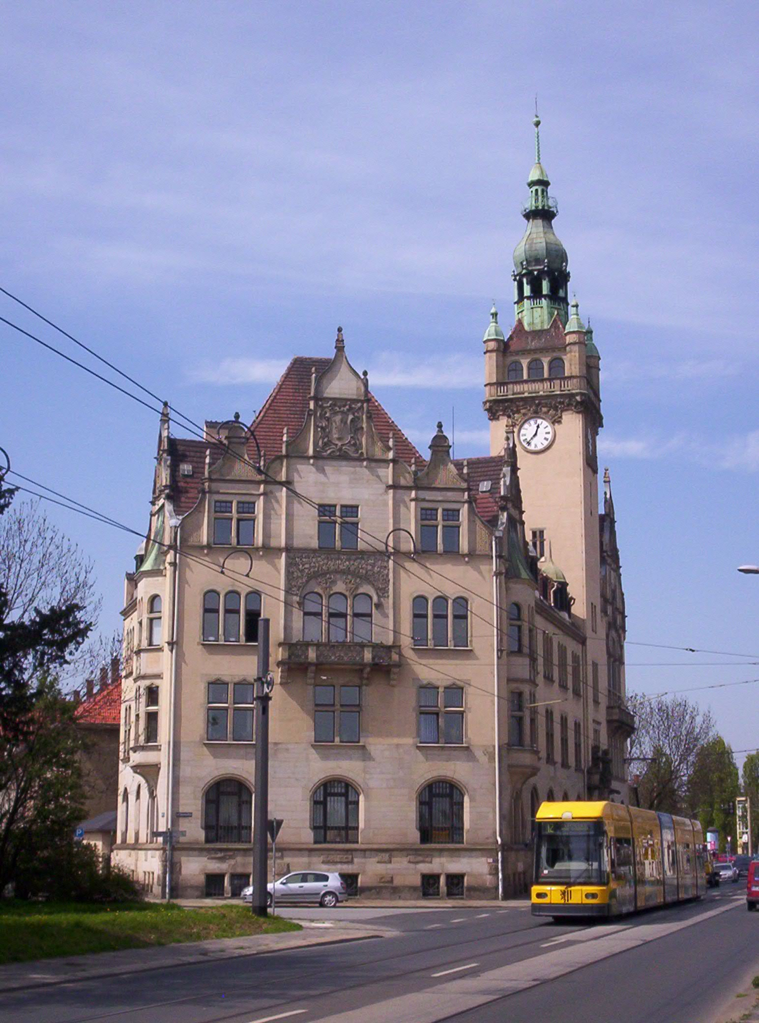 Radnice v Cottě, Drážďany, Německo